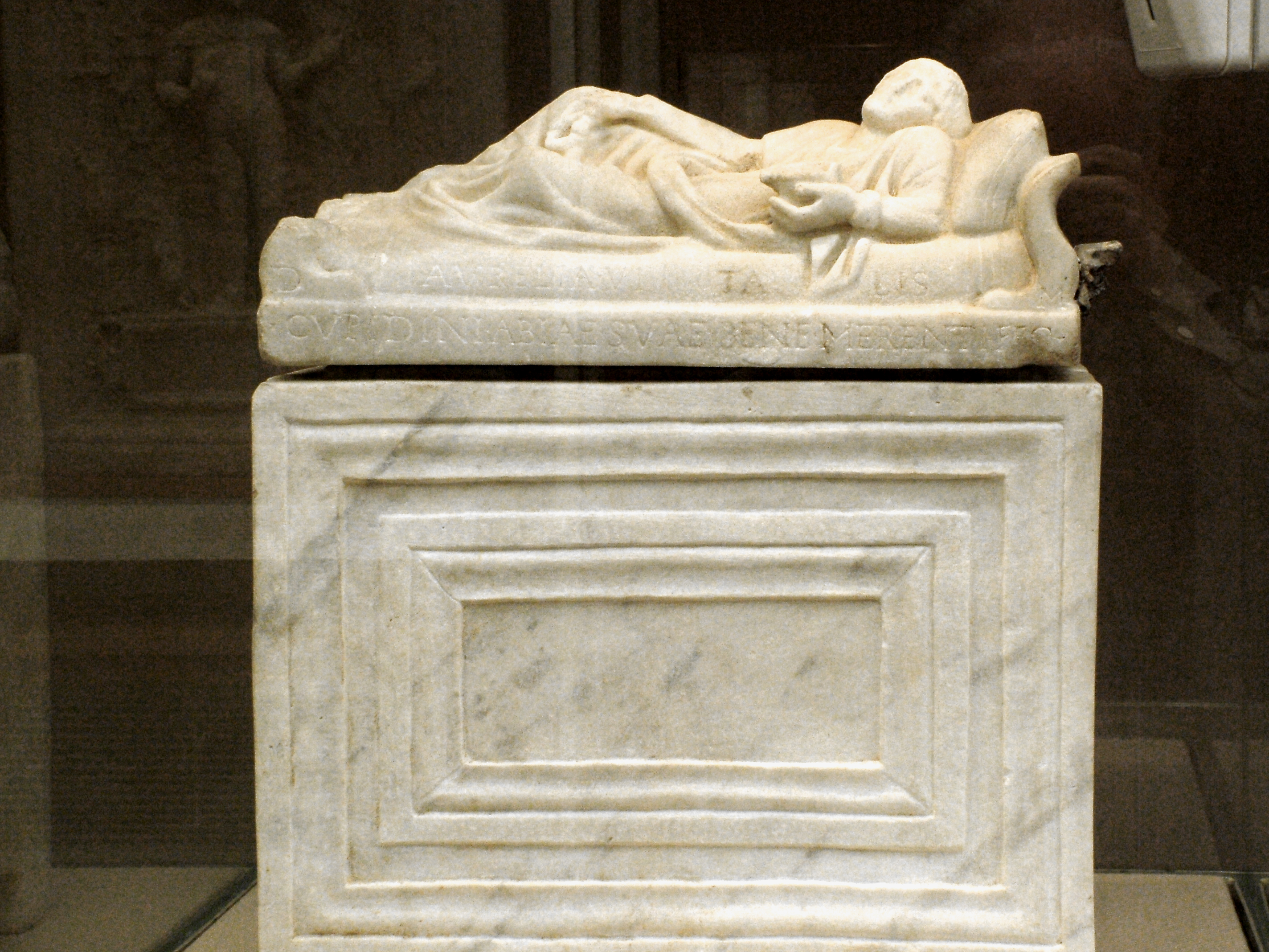 Késő etruszk-római márvány szarkofág (Etruszk Nemzeti Múzeum, Róma)